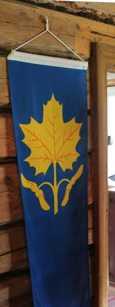 Sammatin viiri